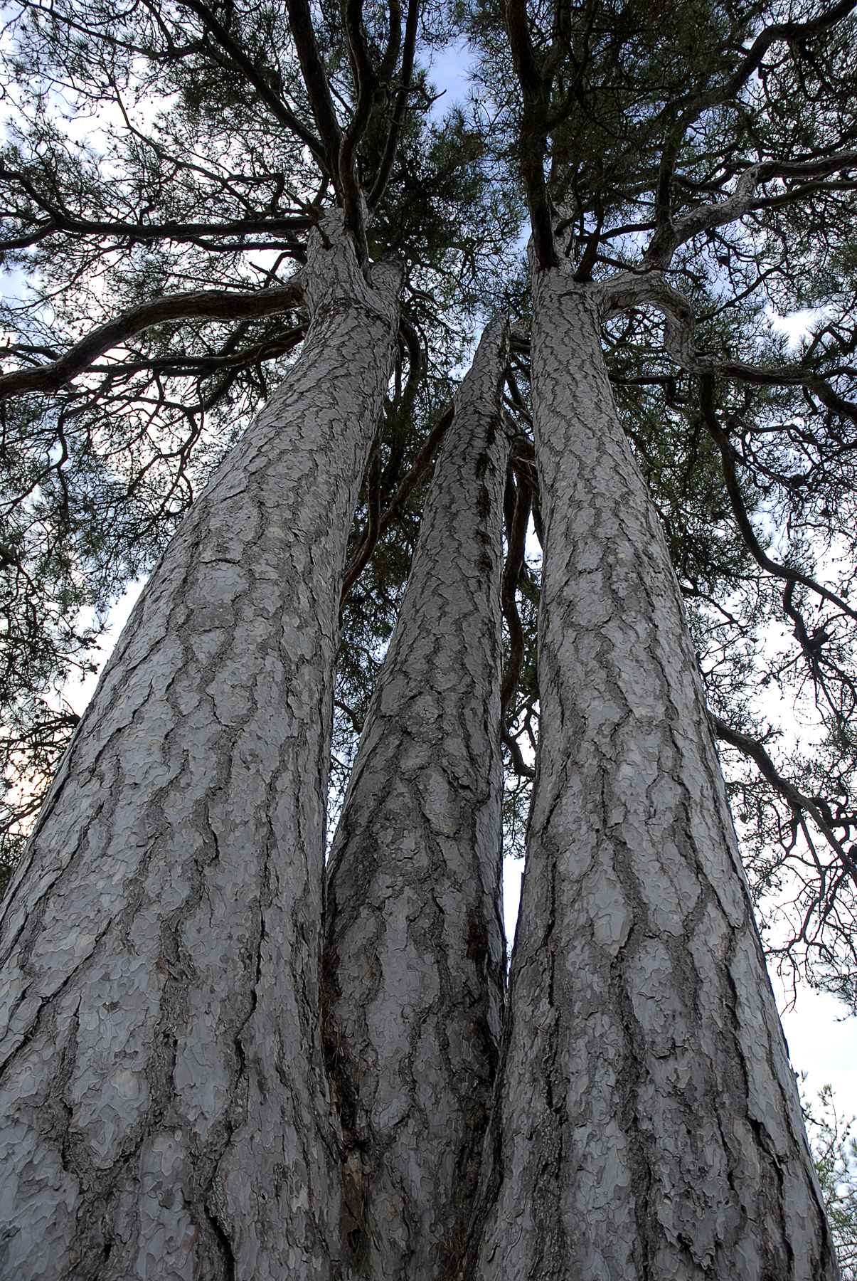 Imatge des de la part inferior de la Pinassa Pinus nigra de la Closella on es pot veure el punt on el tronc es divideix en les seves tres besses.